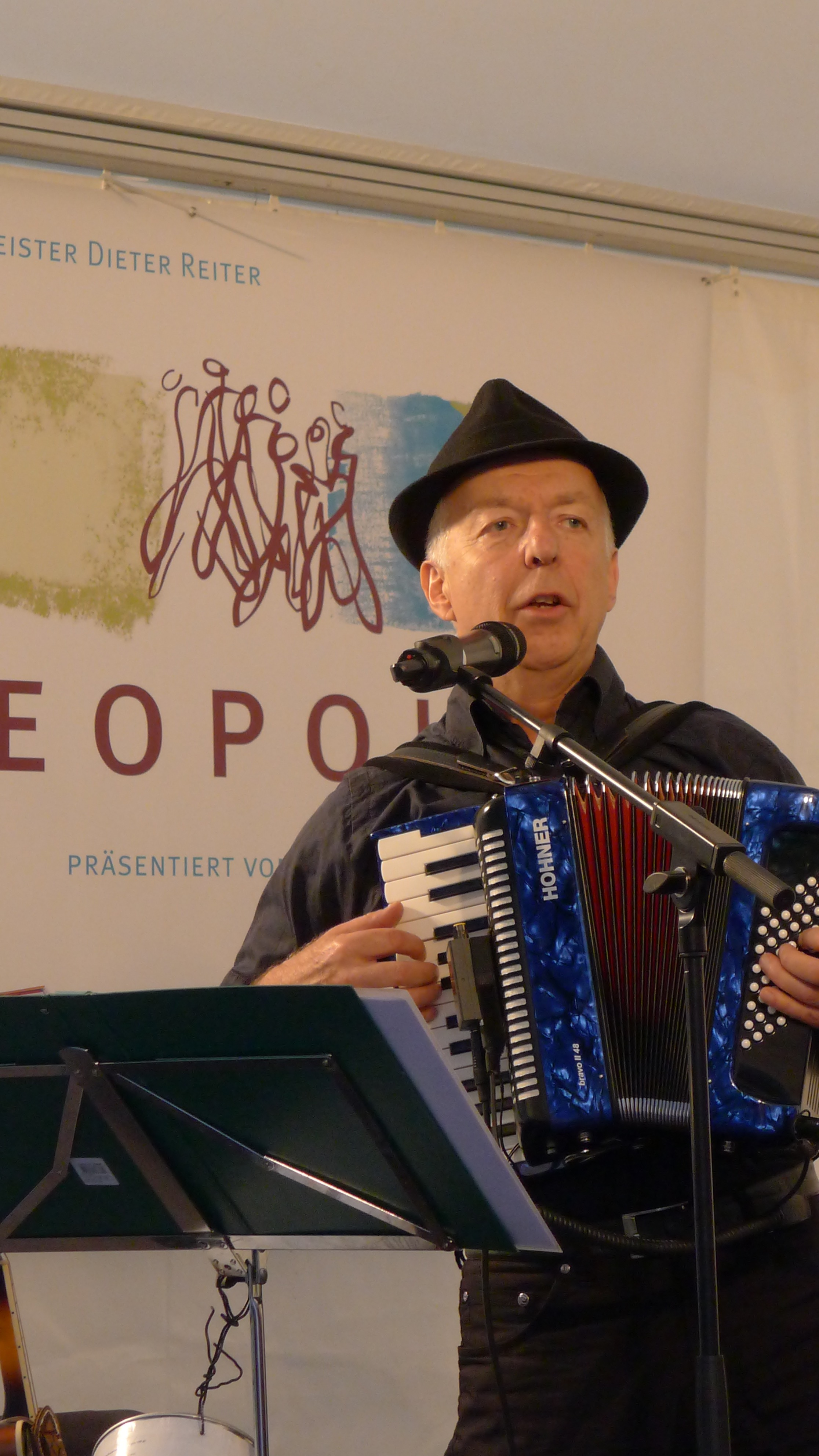 Kabarettist Hanns Meilhammer 2016 auf dem "Corso Leopold" in München